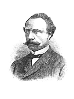 Portret Jan Karel Jacob de Jonge (1828-1880)